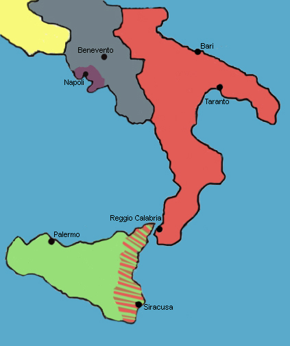 Le conquiste di Giorgio Maniace nel Sud Italia (1038-40). Elaborazione da Image:Le conquiste di Giorgio Maniace..jpg